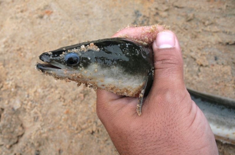 American eel (Anguilla rostrata) 2